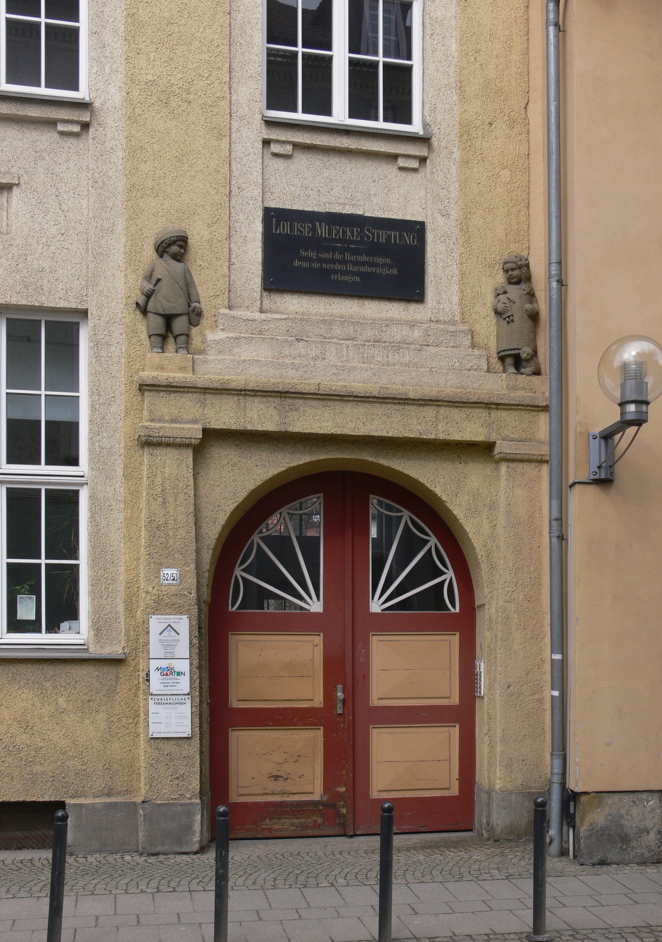 Erfurt, Luise-Mücke-Stiftung (Regierungsstraße 52/53), Reliefs